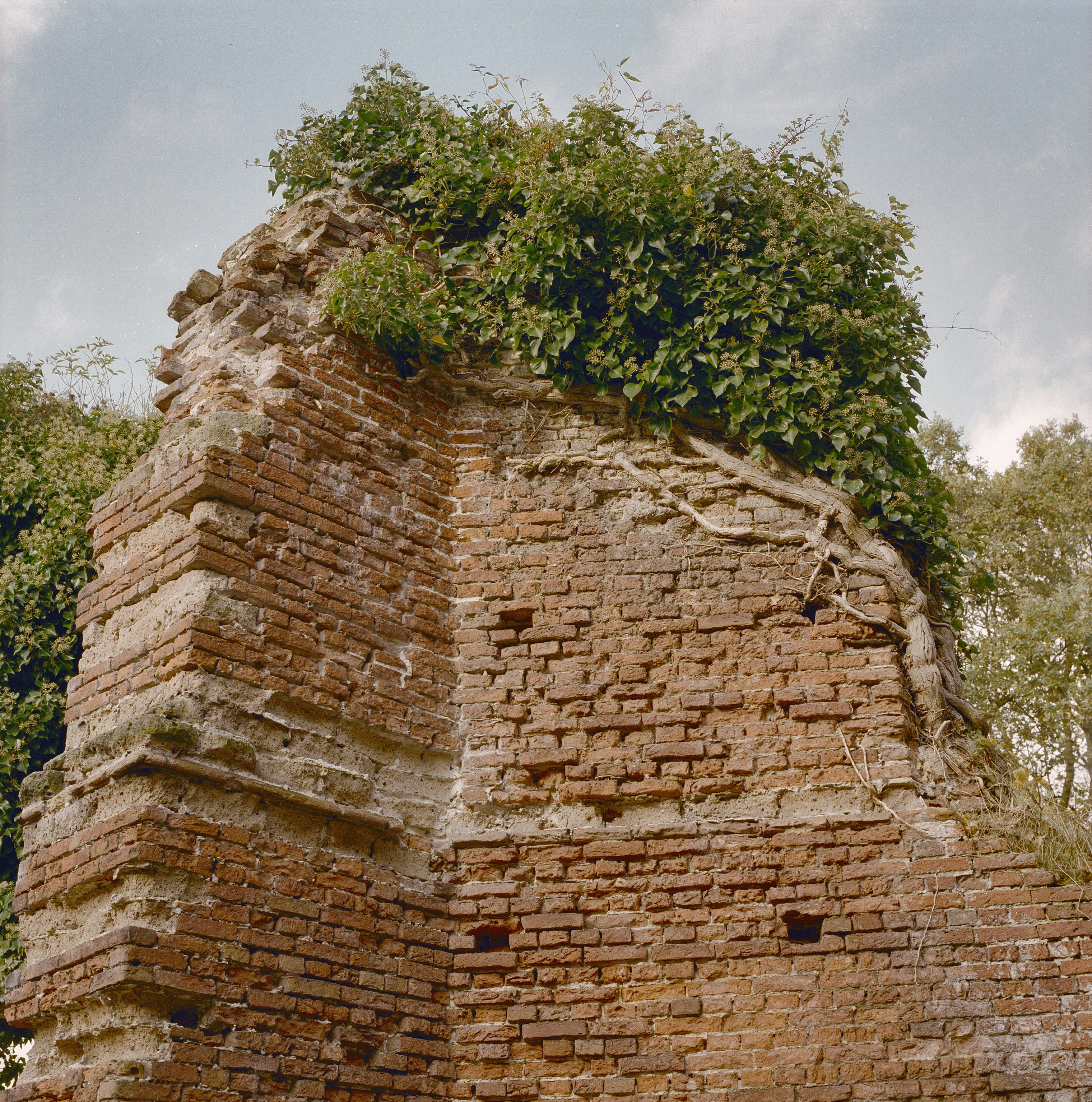 Oude kerk: Exterieur MUUR MET LAGEN TUFSTEEN